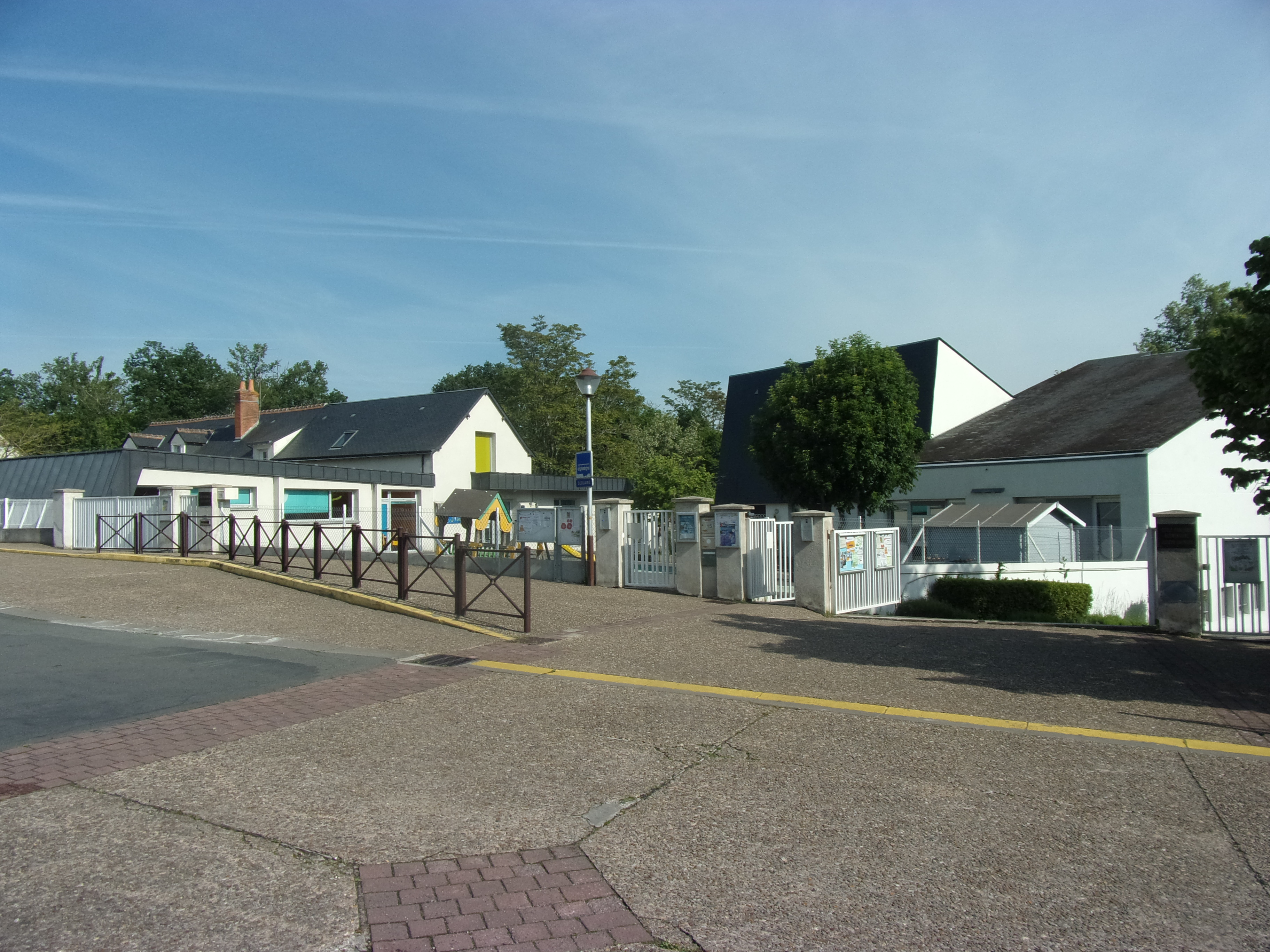 Groupe scolaire Joseph-Daumain (Monts, 37)